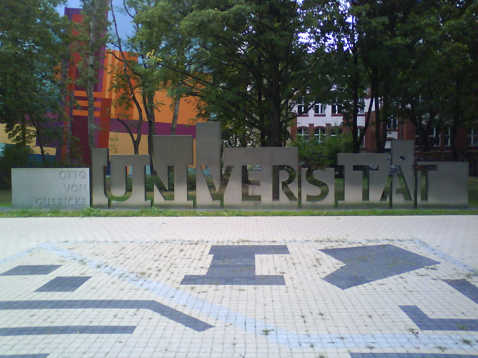 plastik am eingang zum uniersitätsgelände der uni magdeburg